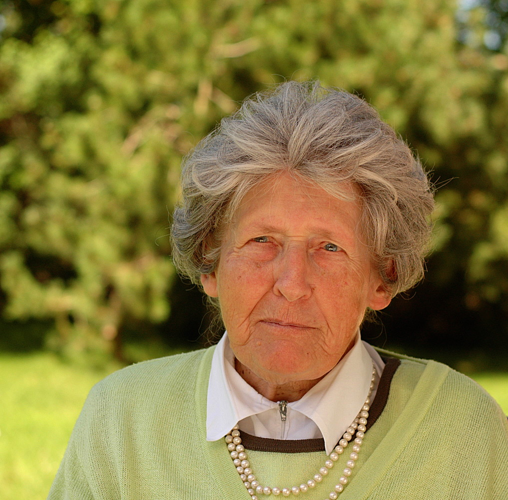 Portrait Agnes-Marie Grisebach in ihrem Garten